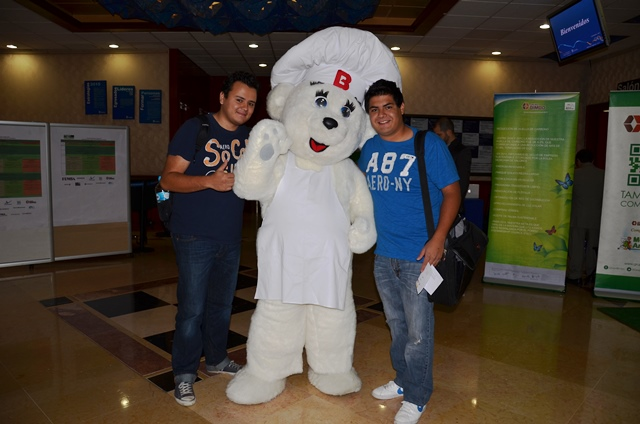 Alumnos de ITESM con la mascota del Bimbo el Cumbre de Negocios Verdes del Instituto Global de Sostenibilidad en el ITESM-Campus Ciudad de Mexico